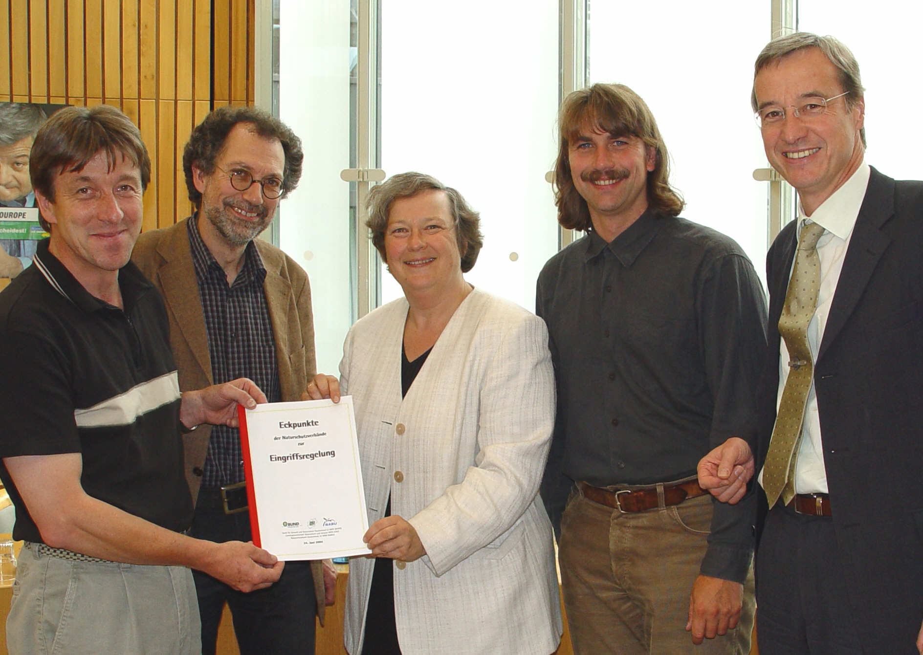 Die Landesvorsitzenden der NRW-Naturschutzverbände übergeben der damaligen NRW-Umweltministerin Bärbel Höhn ihre Eckpunkte zur Eingriffsregelung (v.l.: Klaus Brunsmeier (BUND), Mark vom Hofe (LNU), Bärbel Höhn, Josef Tumbrinck (NABU), Dr. Thomas Griese (damaliger Staatssekretär im Umweltministerium))